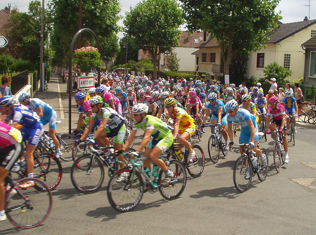 Passage du Tour de France à Antony